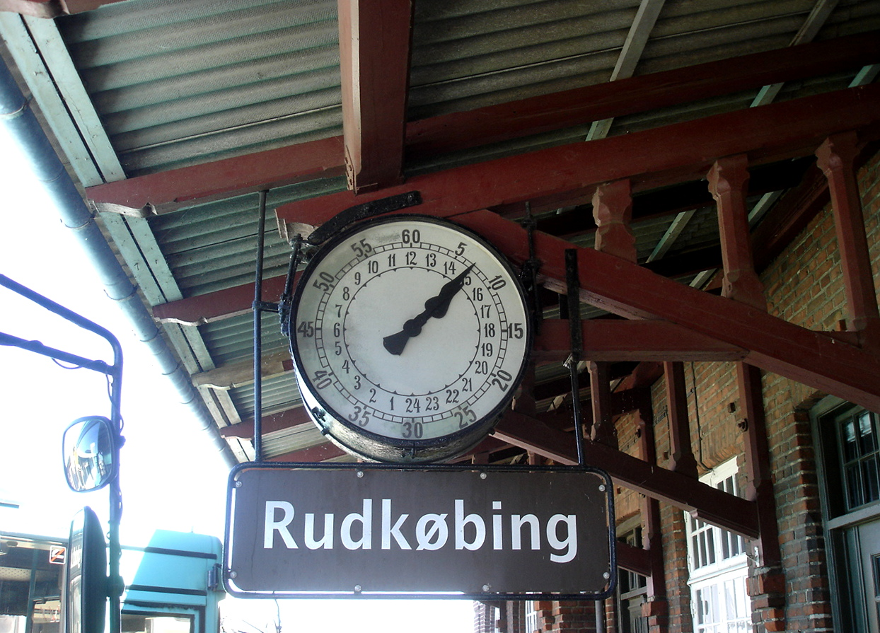 24 timers uret på Rudkøbing Station